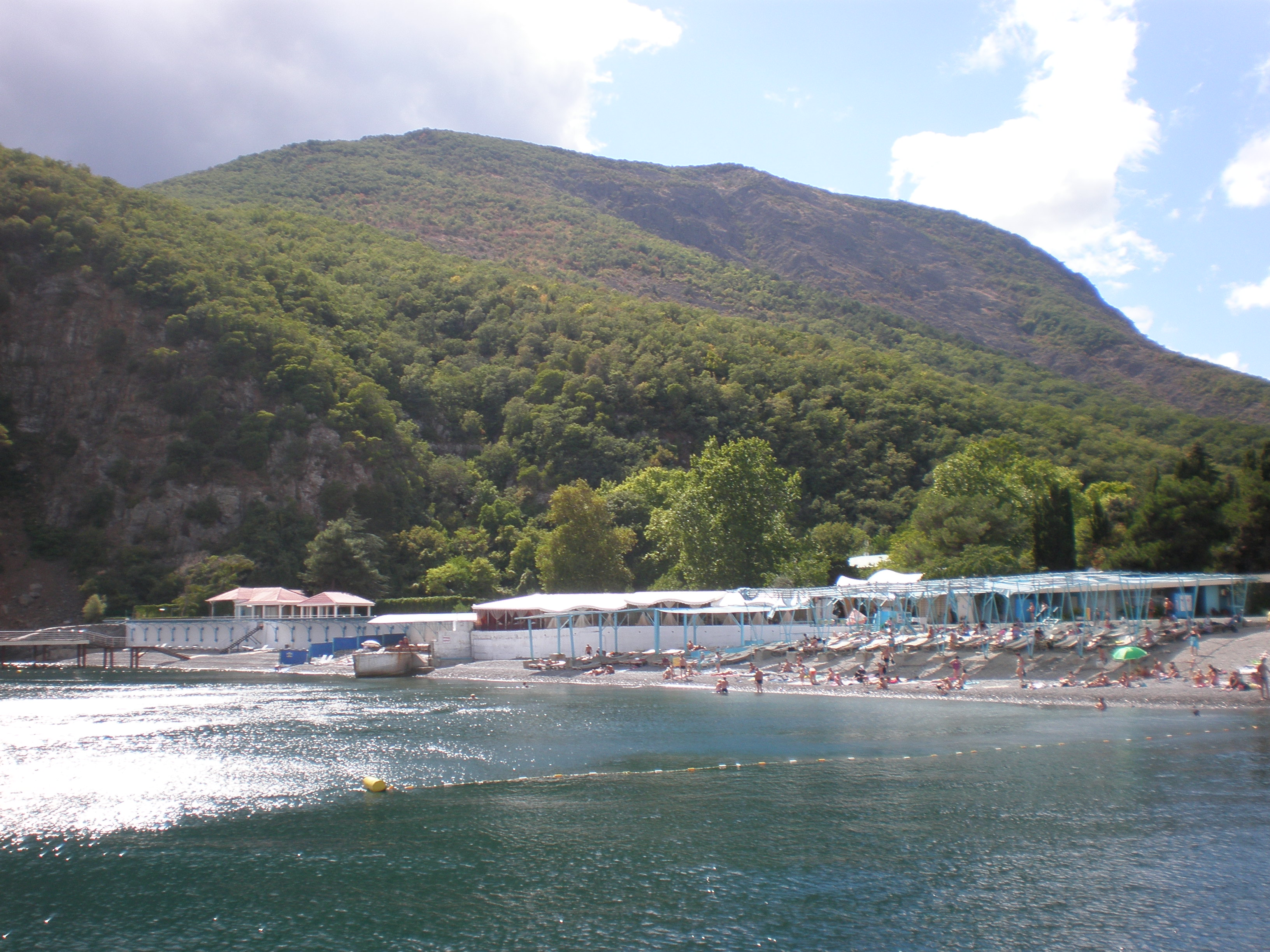 Аю-Даг, Запрудниньське л-во, кв.32 сел. Партеніт